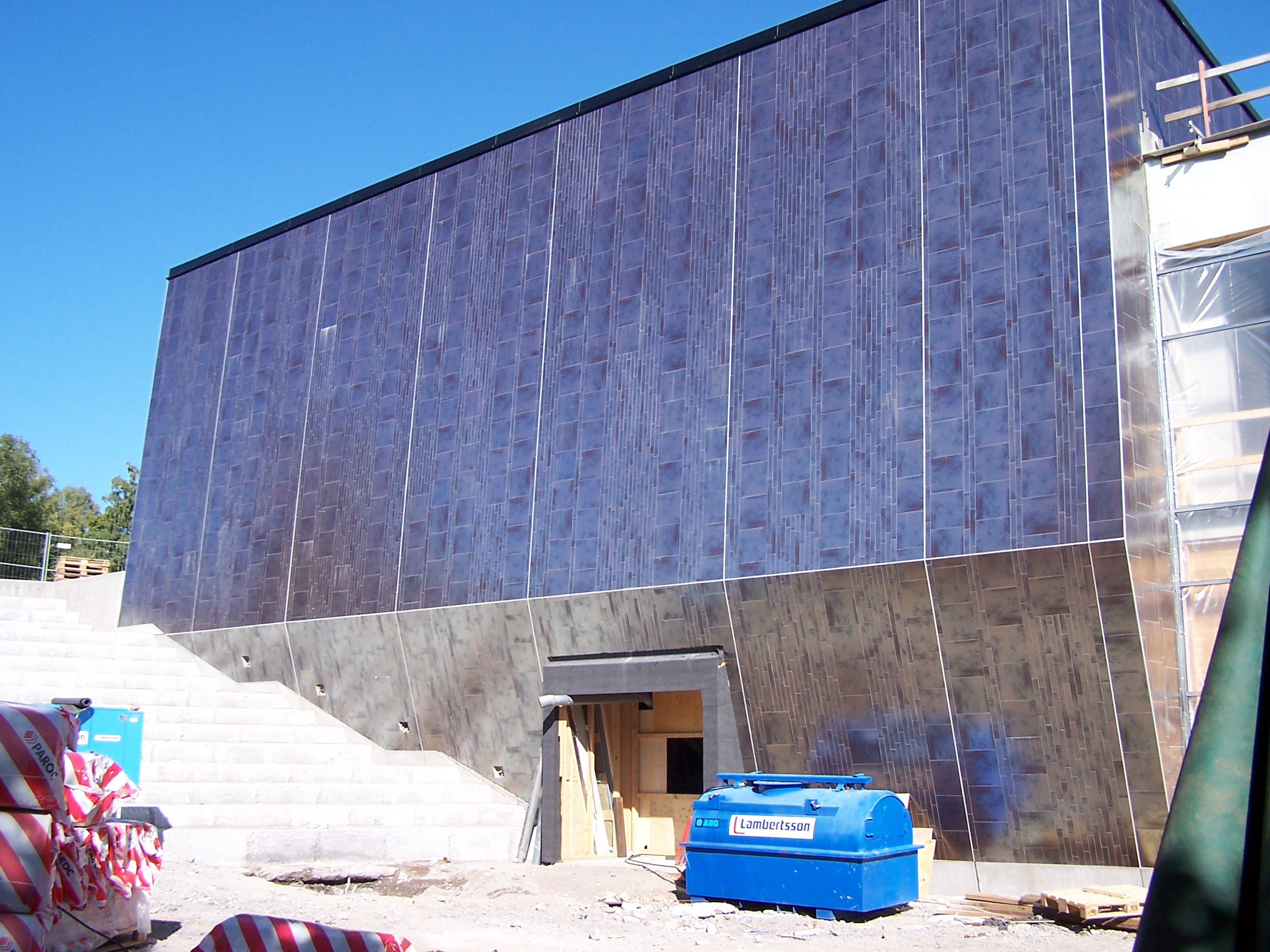 Bild av Satelliten